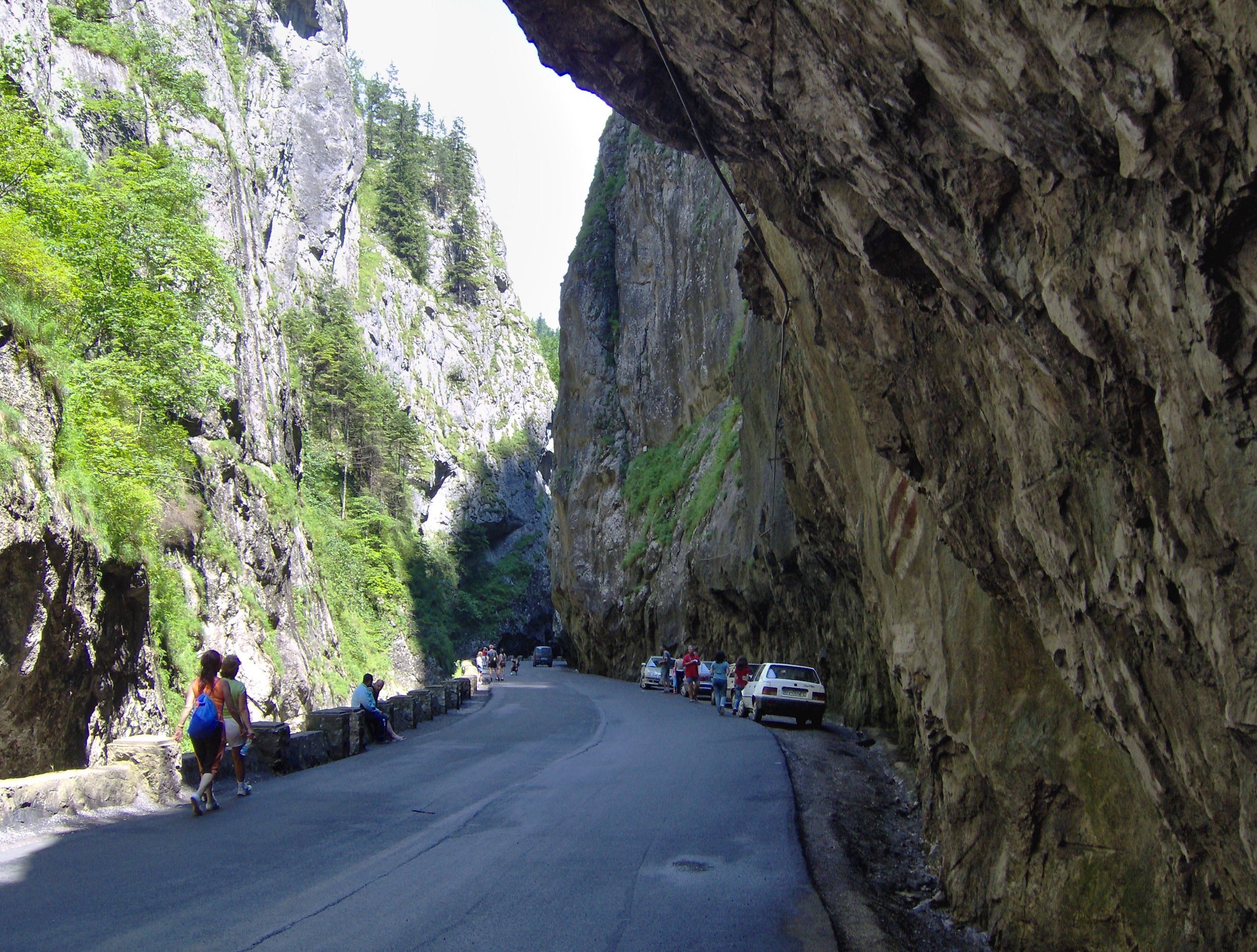 Cheile Bicazului, 2006